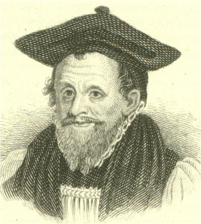 Erzbischof von Canterbury Richard Bancroft (* 1544 in Farnworth, Lancashire; † 2. November 1610 in London)